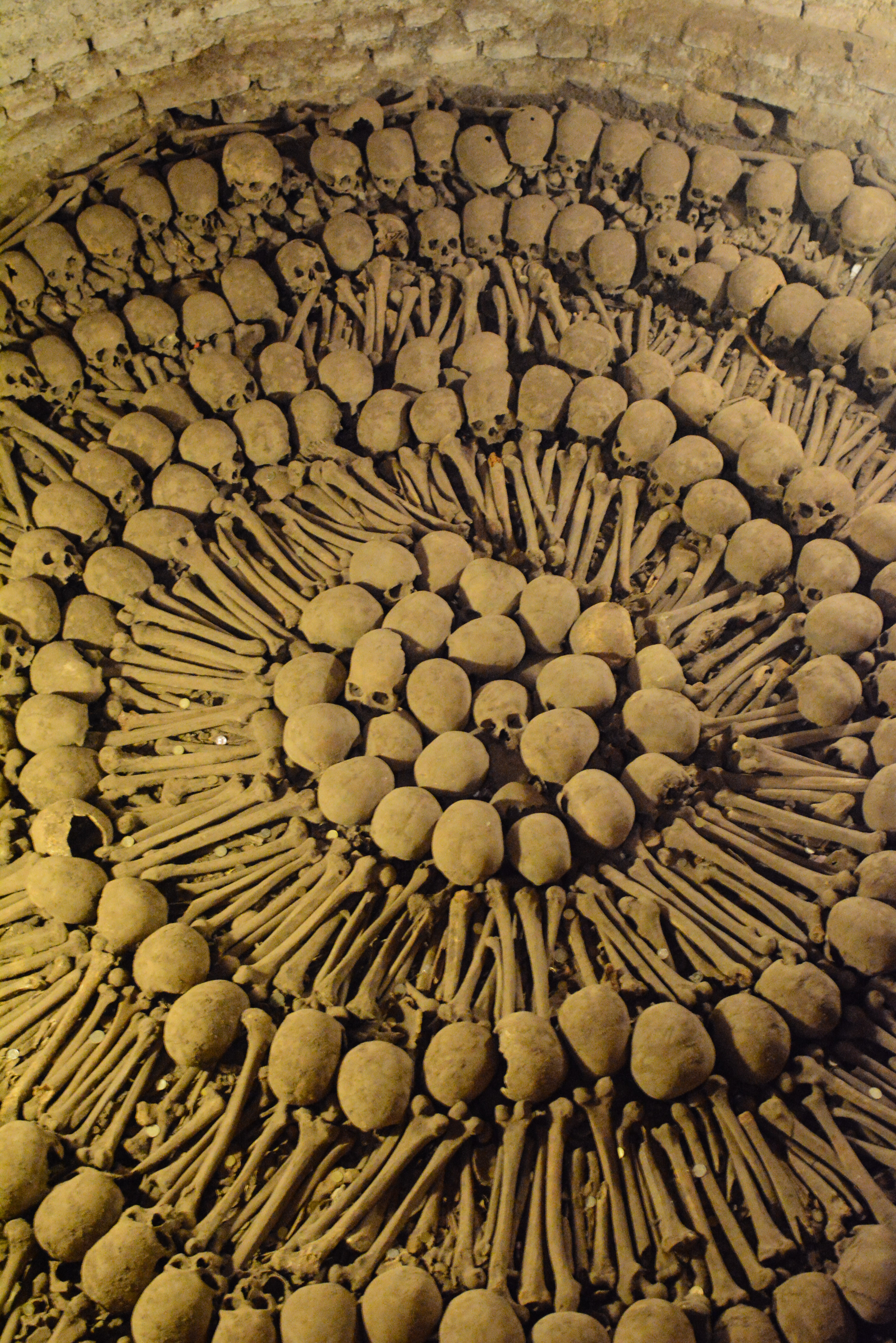 Lima, Peru